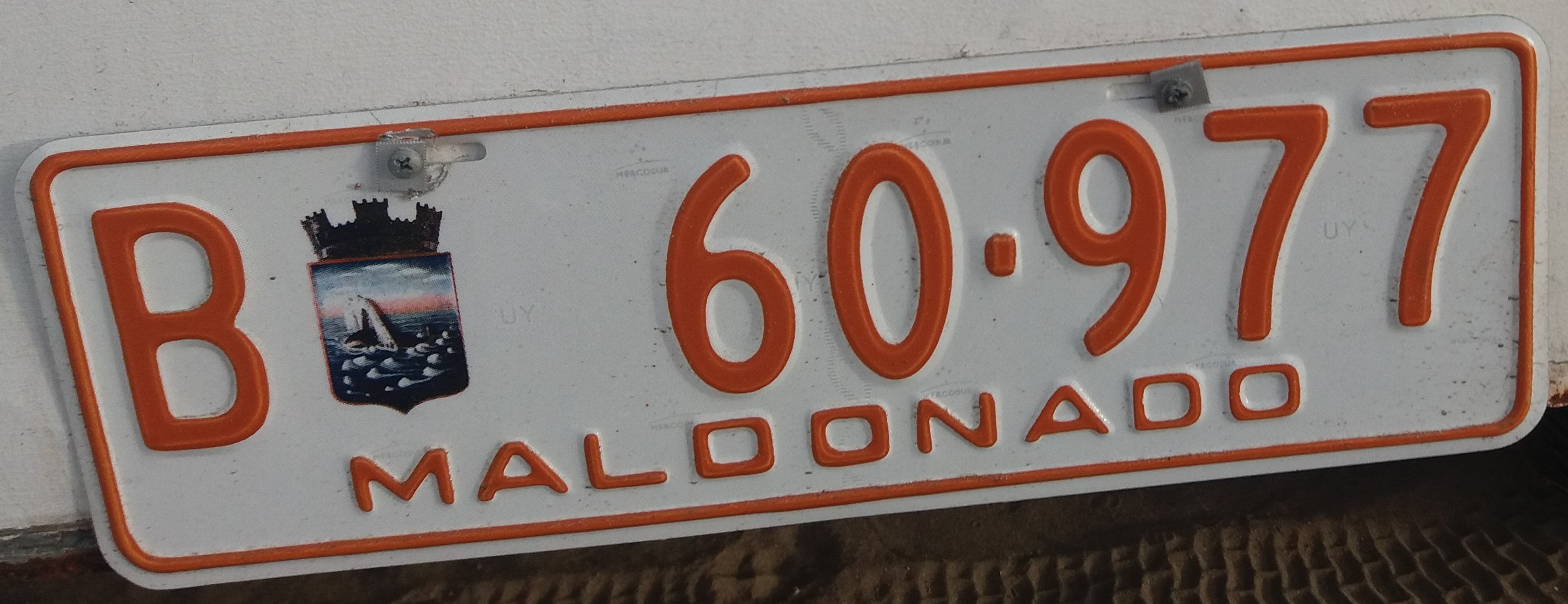 Matrículas de remolque de Maldonado, Uruguay; se destaca la presencia de los mismos sellos de seguridad empleados en las matrículas del Mercosur.